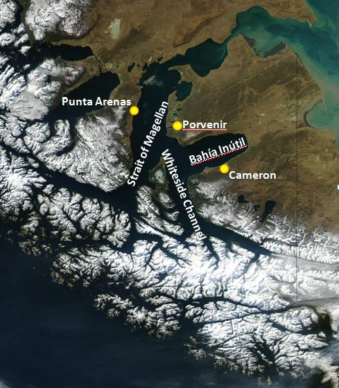 Emplacement de la baie Inútil sur la Grande Île de Terre de Feu